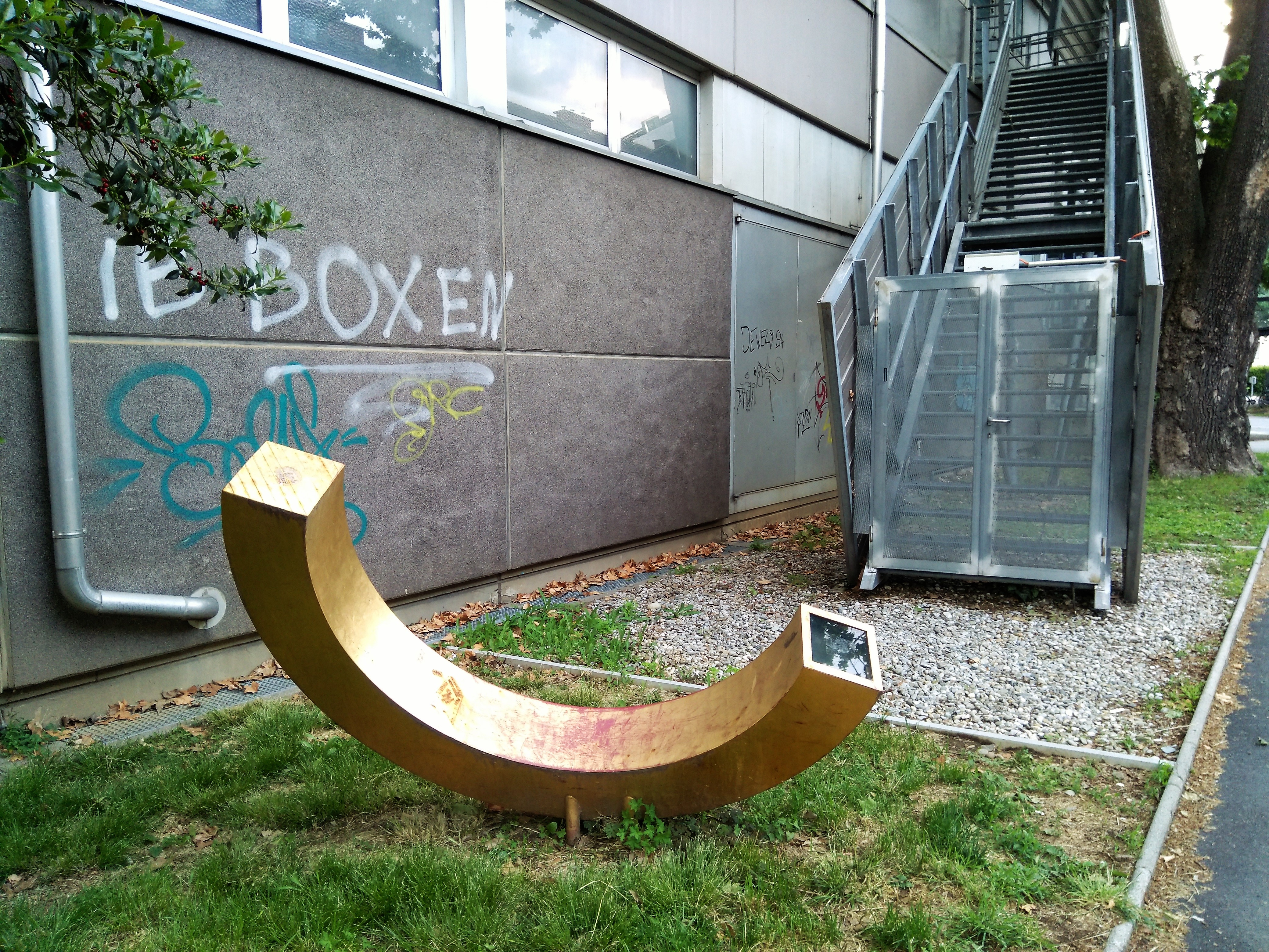 Ehrenring. Denkmal für Oktavia Aigner-Rollett